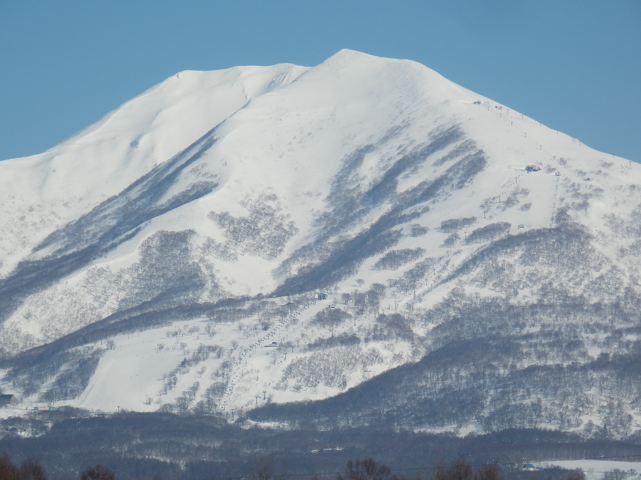 ニセコ町里見付近から望む